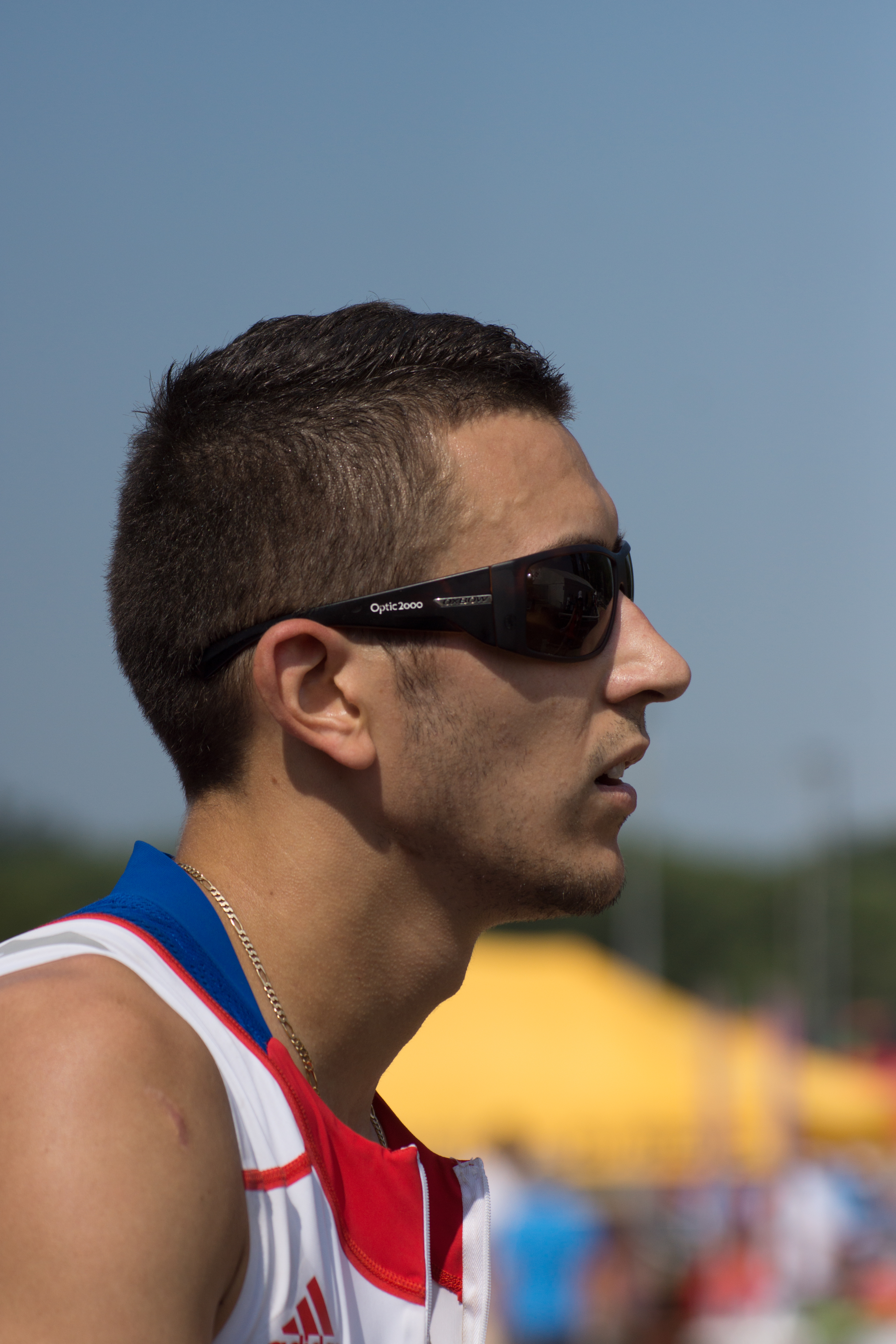 Championnats du monde d'athlétisme handisport 2013.